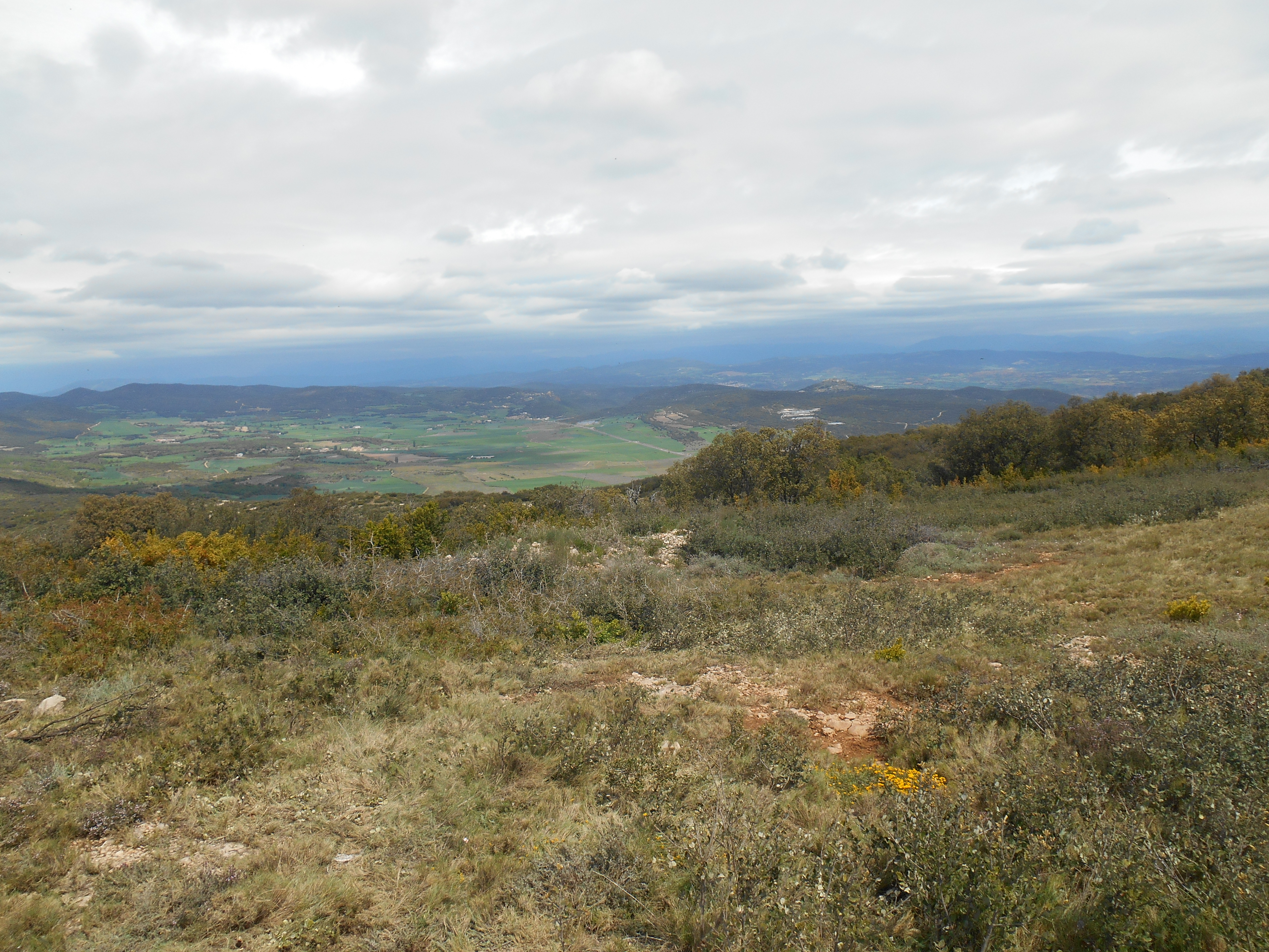 Vistas desde la Ermita de San Quílez, hacia la parte este de la Sierra de la Carrodilla, y el Pirineo